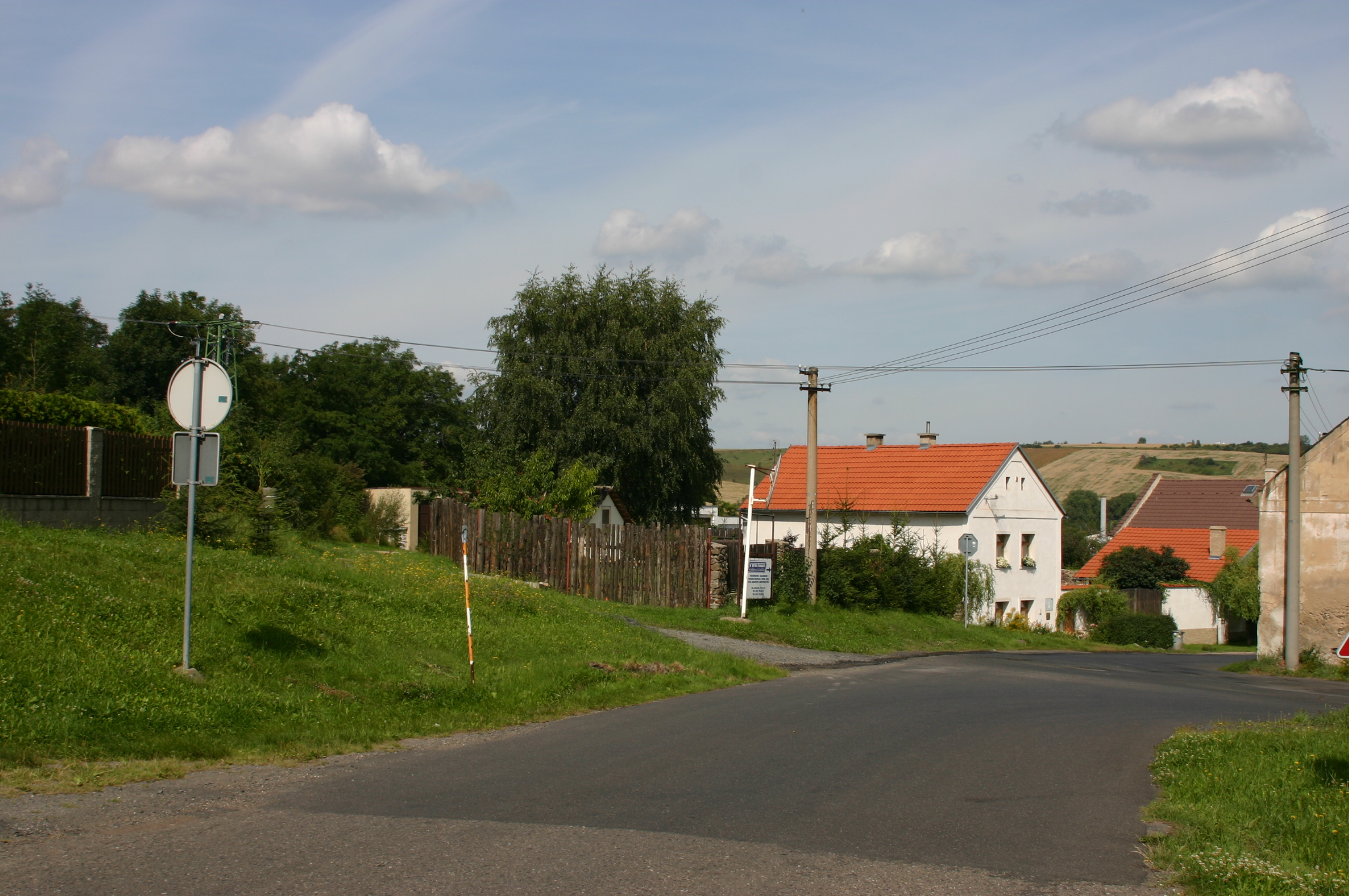 Osada Sedlec v okrese Most (střed)